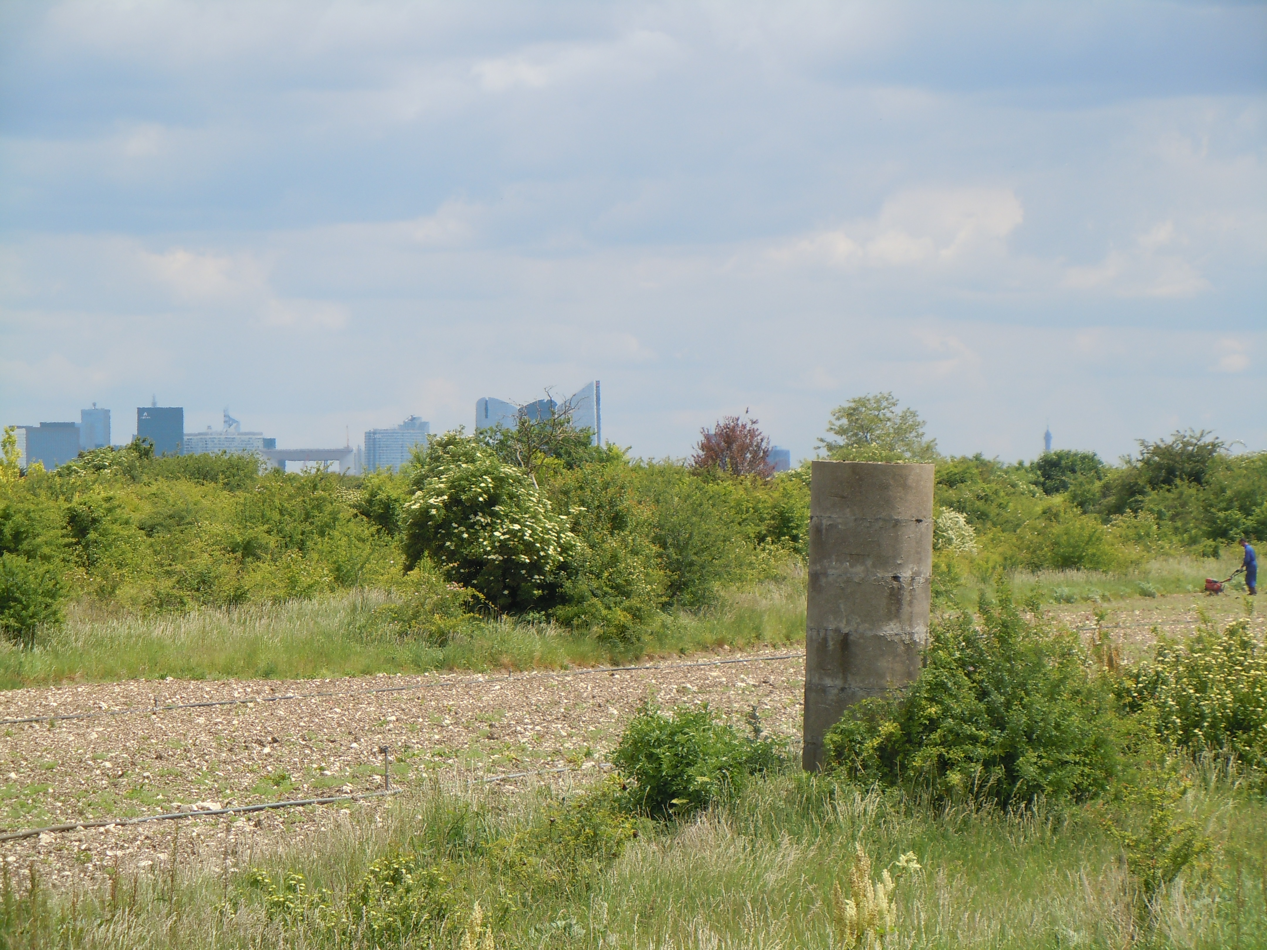 Cheminée d'aréation d'une champignonnière dans la plaine de Montesson devant le quartier de la Défense